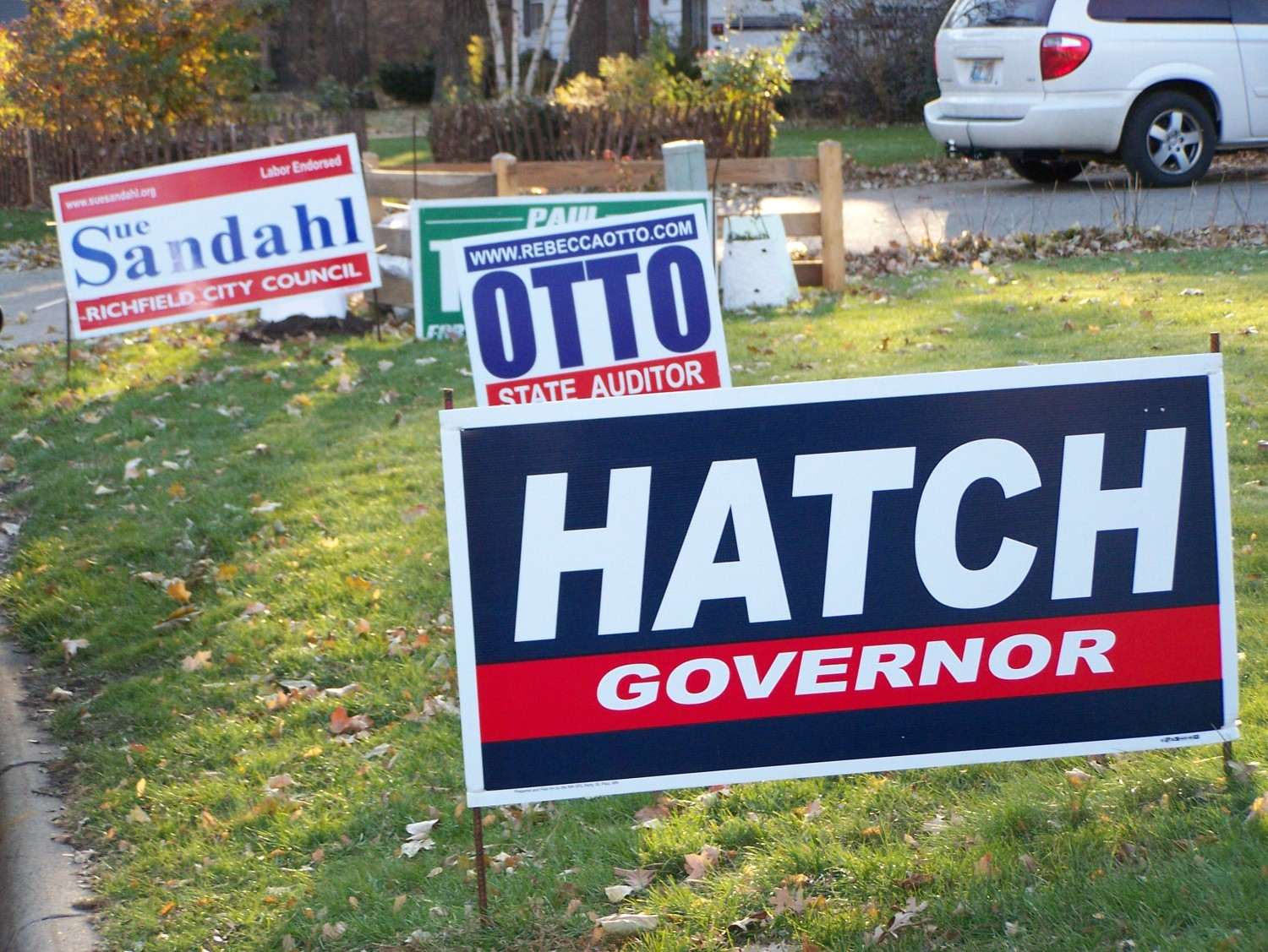 2006 Election